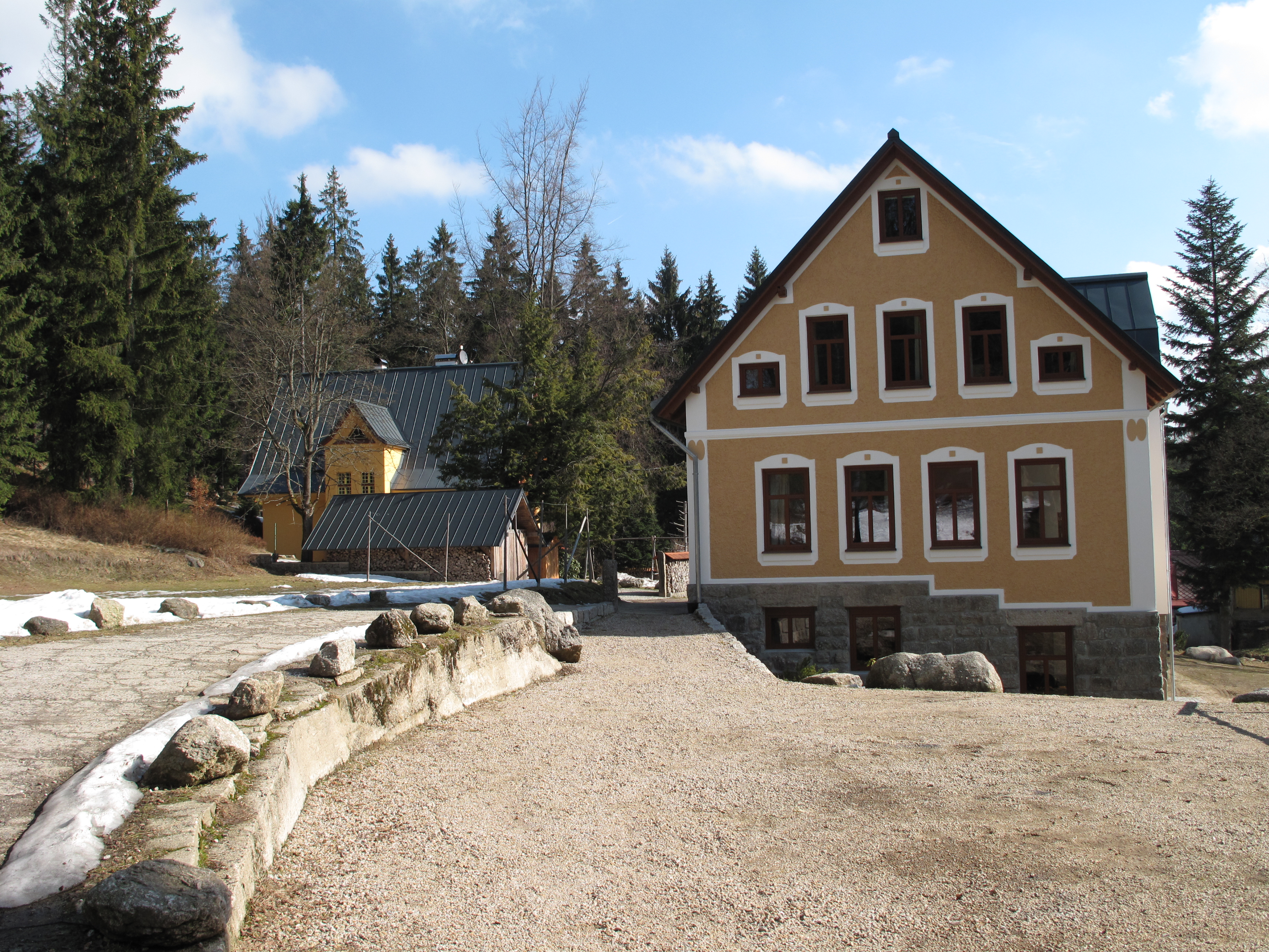 Dům v Karlově. Okres Jablonec nad Nisou, Česká republika.